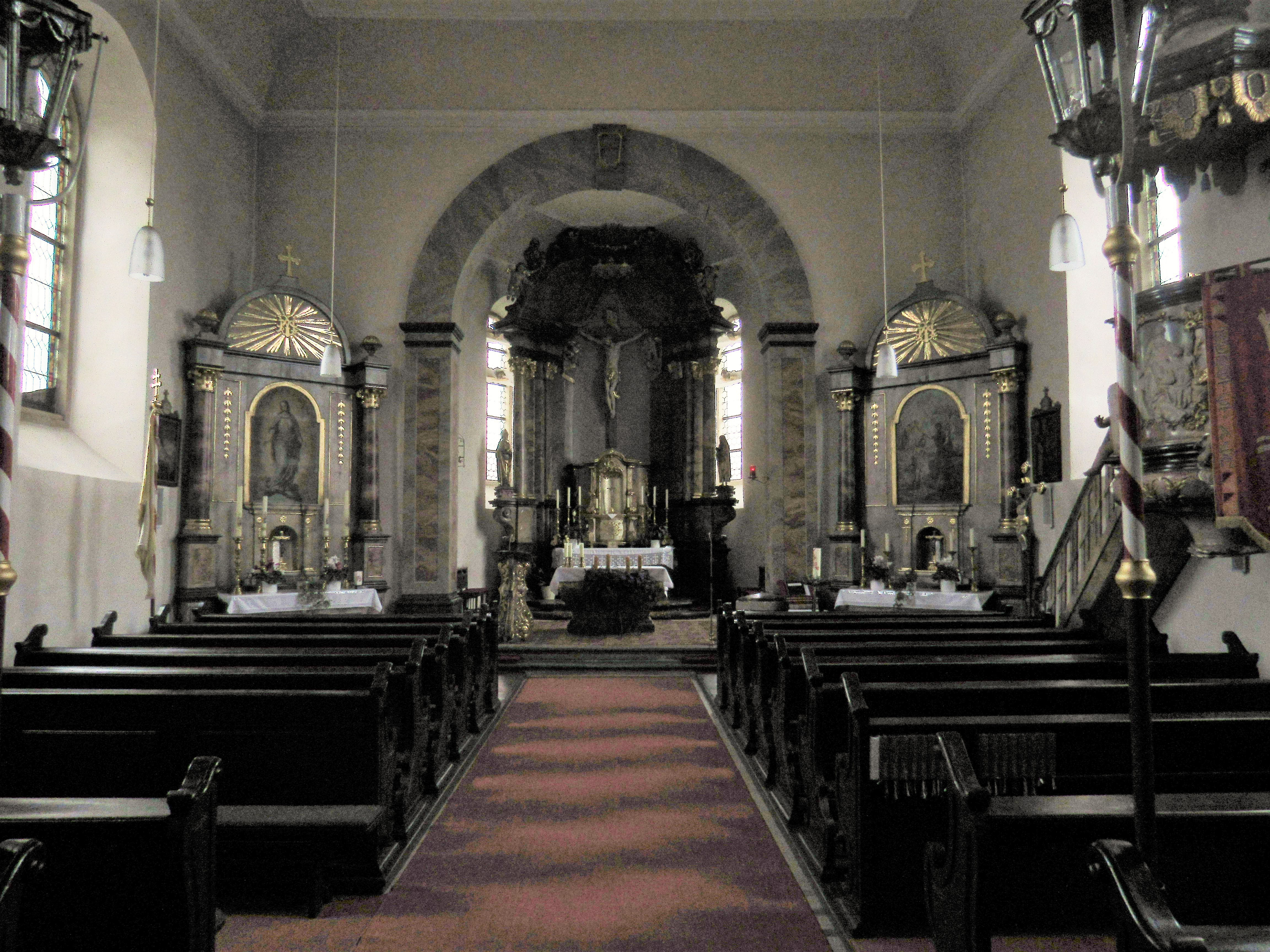 Innenraum der Kirche in Sömmersdorf